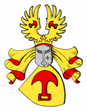 Armes de la Famille Franckenstein